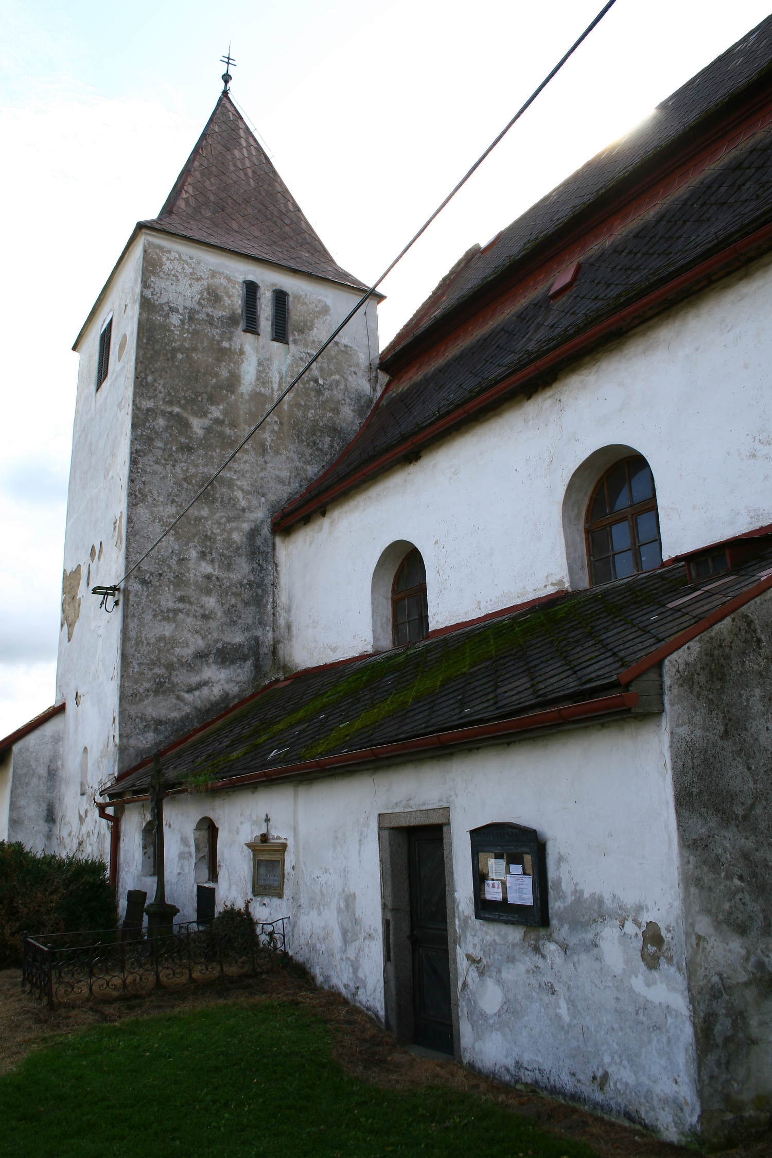 Kostel svatého Petra a Pavla v Albrechticích. Věž a severní stěna. Okres Klatovy, Plzeňský kraj, Česká republika.